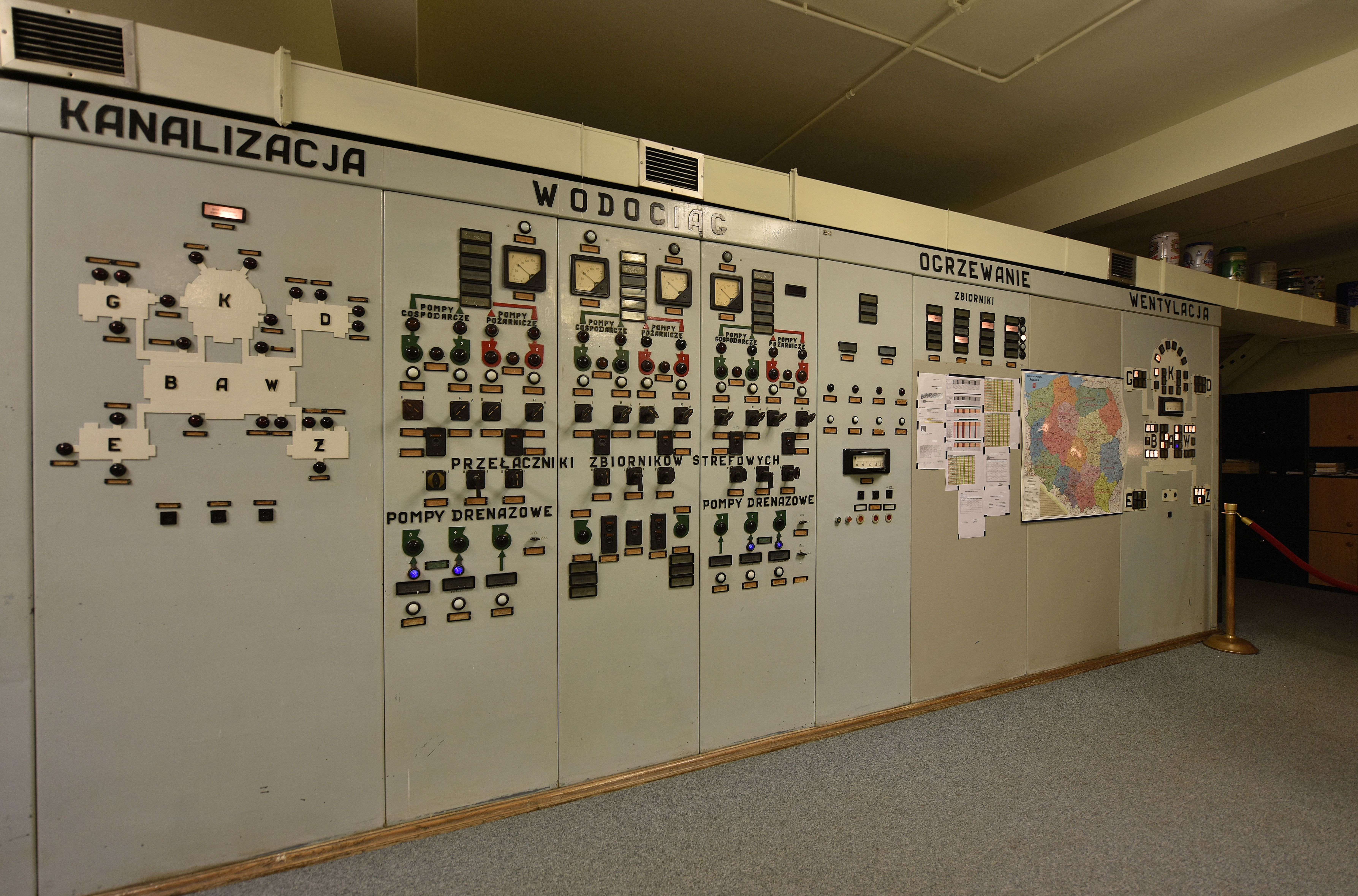 Pomieszczenie dyspozytorni na poziomie -1 Pałacu Kultury i Nauki